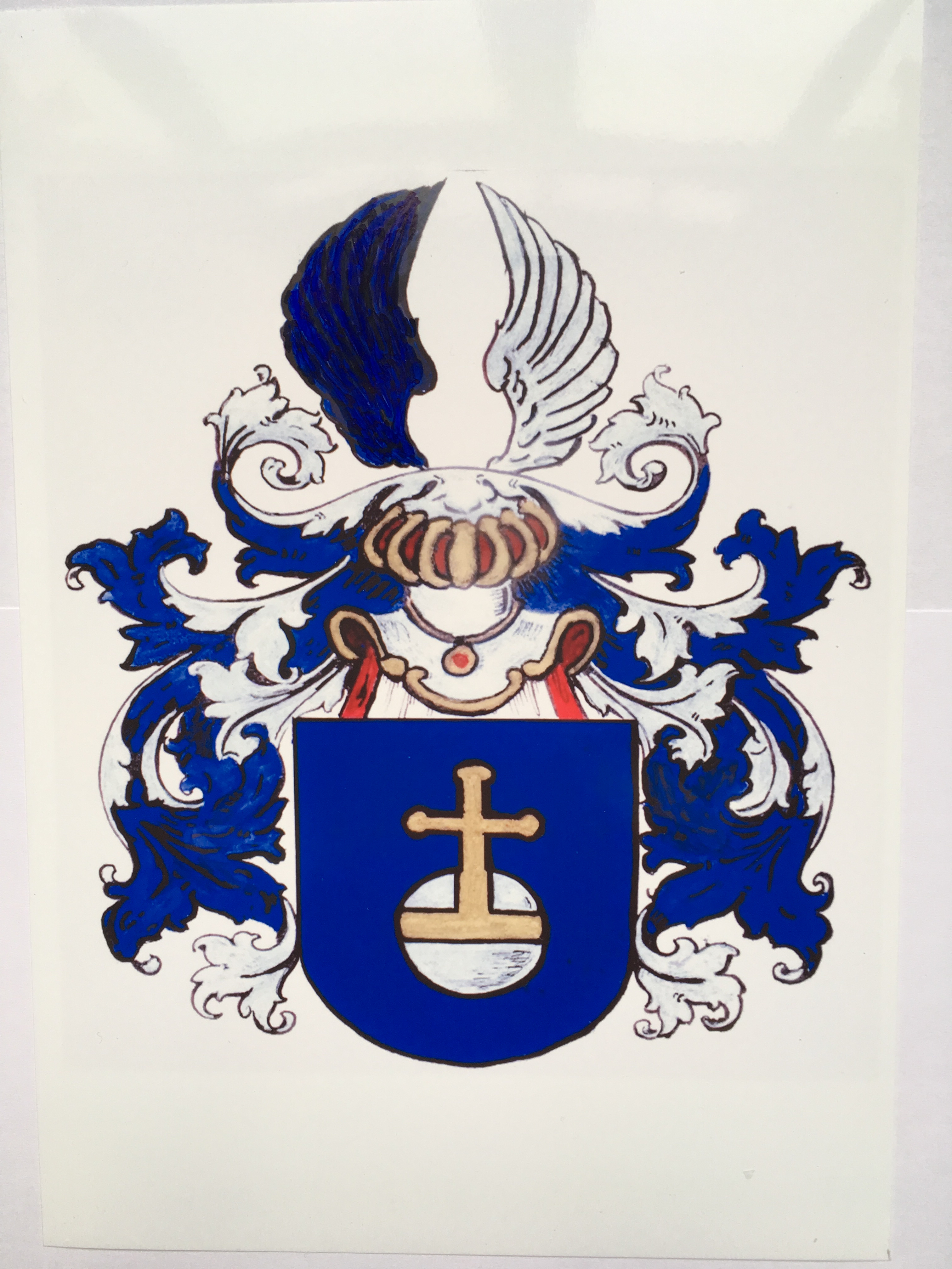 In blauw een zilveren wereldbol, goud gekruist en omgord, het kruis met bolvormige uiteinden. Helmteken: een vlucht van blauw en zilver. Dekkleden: blauw, gevoerd van zilver